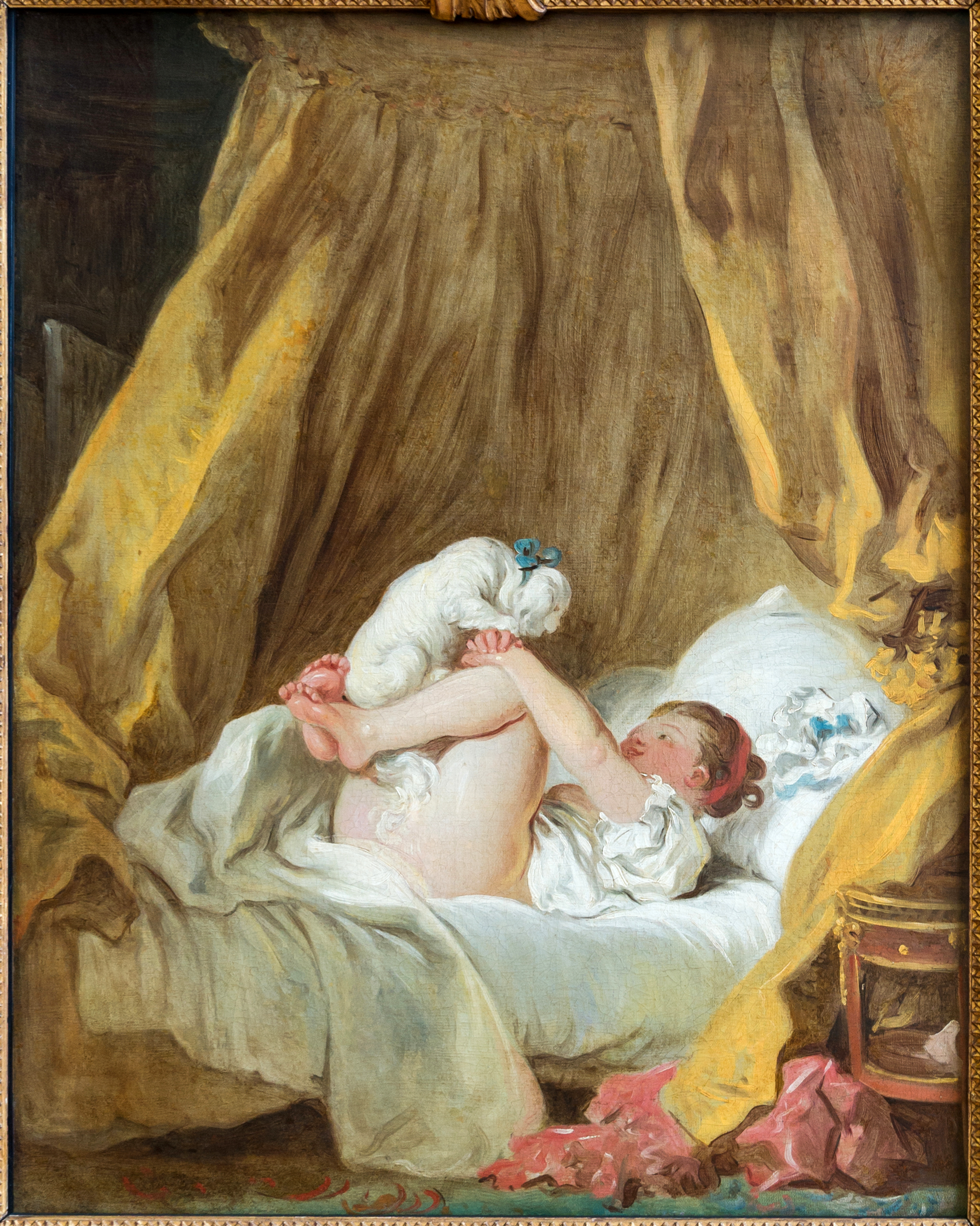 sketch/esquisse/Skizze